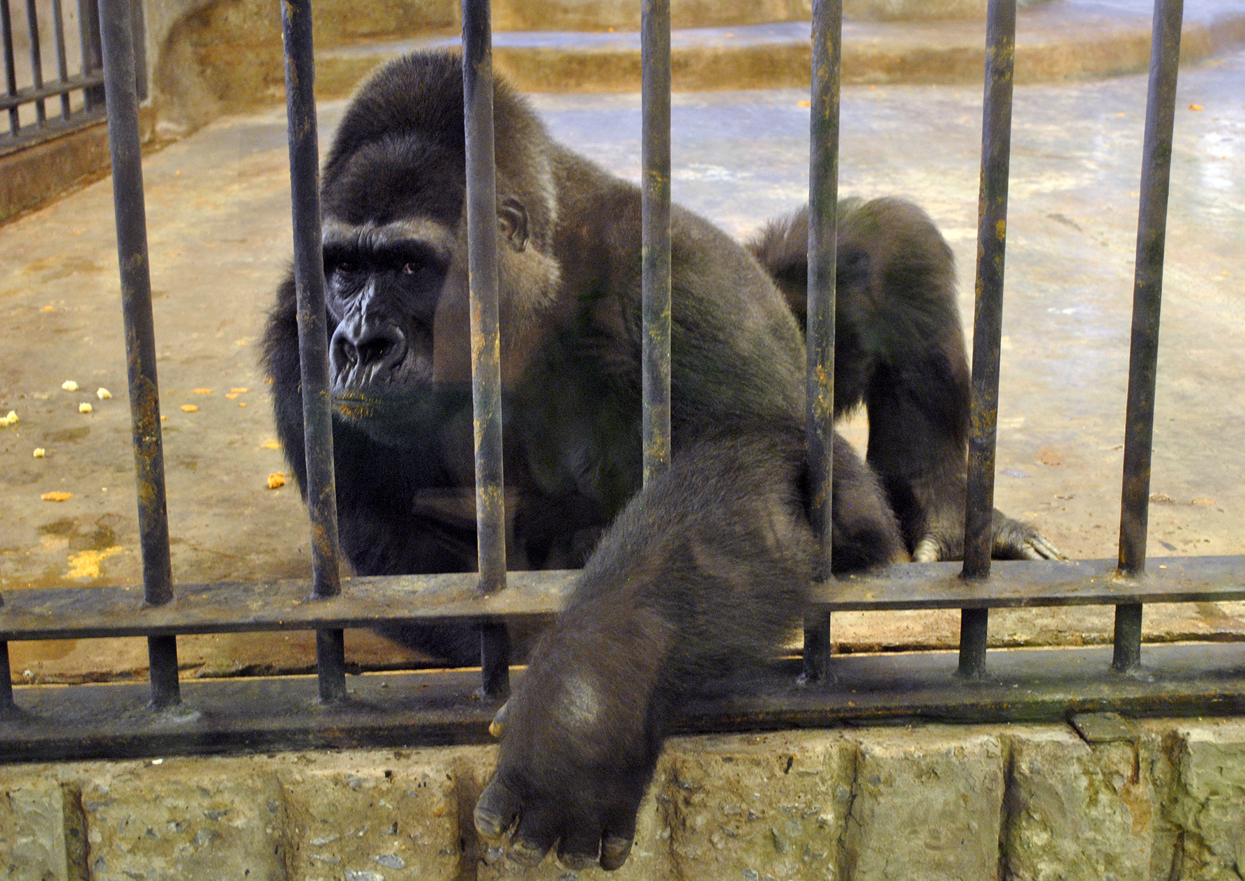 Bua Noi